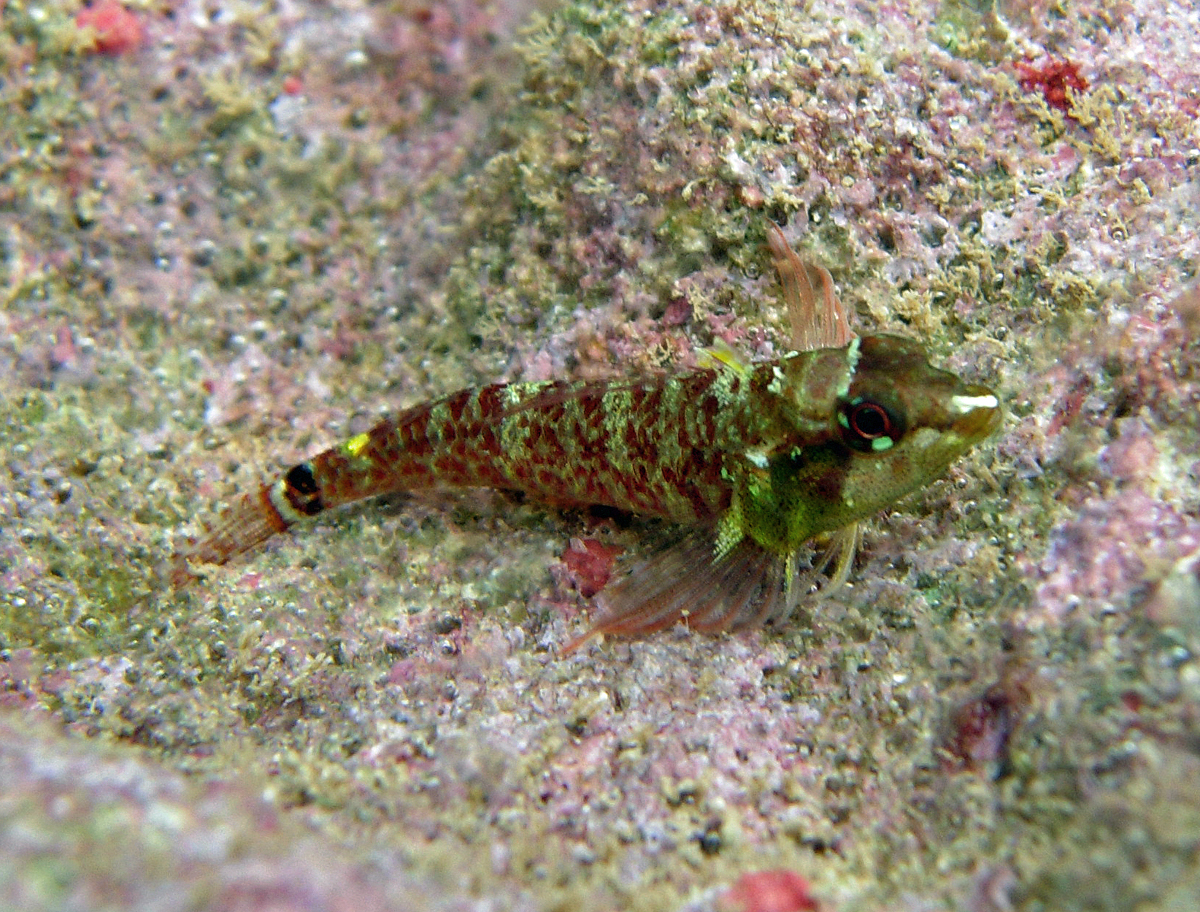 Enneapterygius elegans à la Réunion.